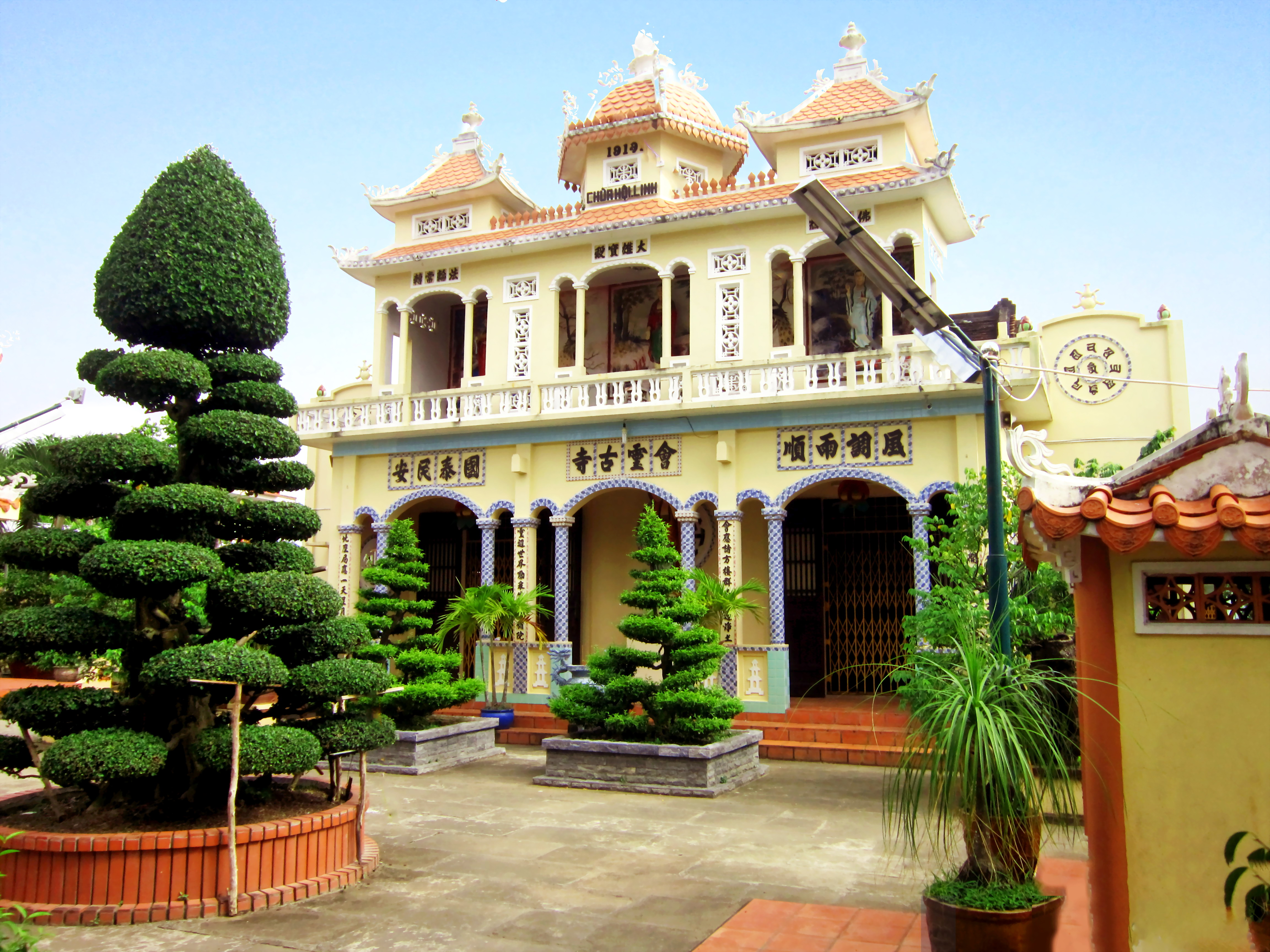 Mặt tiền chùa Hội Linh (còn gọi là Hội Linh Cổ Tự) xây dựng năm 1907; hiện tọa lạc tại số 314/36 đường Cách mạng Tháng Tám, phường Bùi Hữu Nghĩa, quận Bình Thủy, thành phố Cần Thơ, Việt Nam.